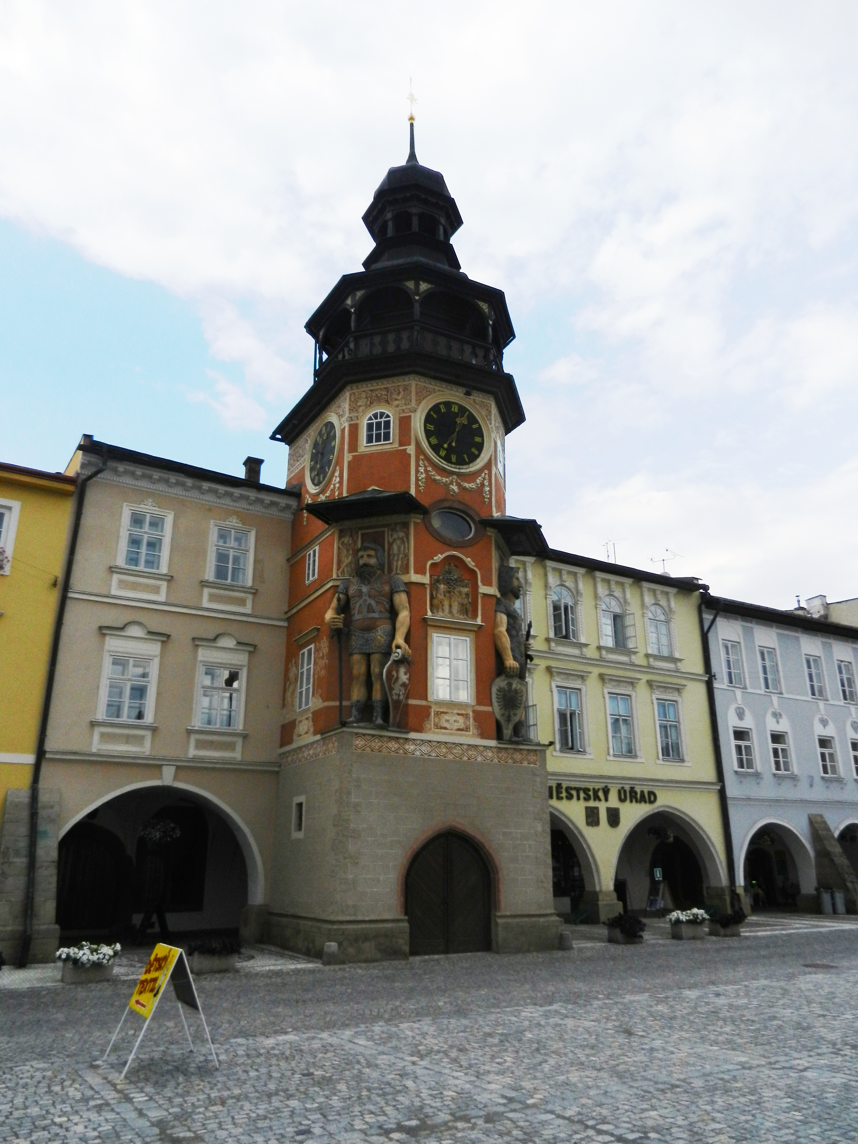 Rathaus in Hostinne im Riesengebirge wurde 1525 "spätgotischer Neubau", 1566 erneuter Aufbau nach Pulverexplosion, im 19.Jhrh. neue Frontgestaltung durch Giebelumbau durch Überbauung zweier Häuser.